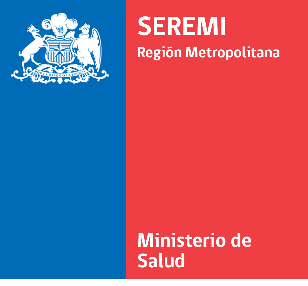 Logo institucional del Seremi de Salud de la Región Metropolitana.